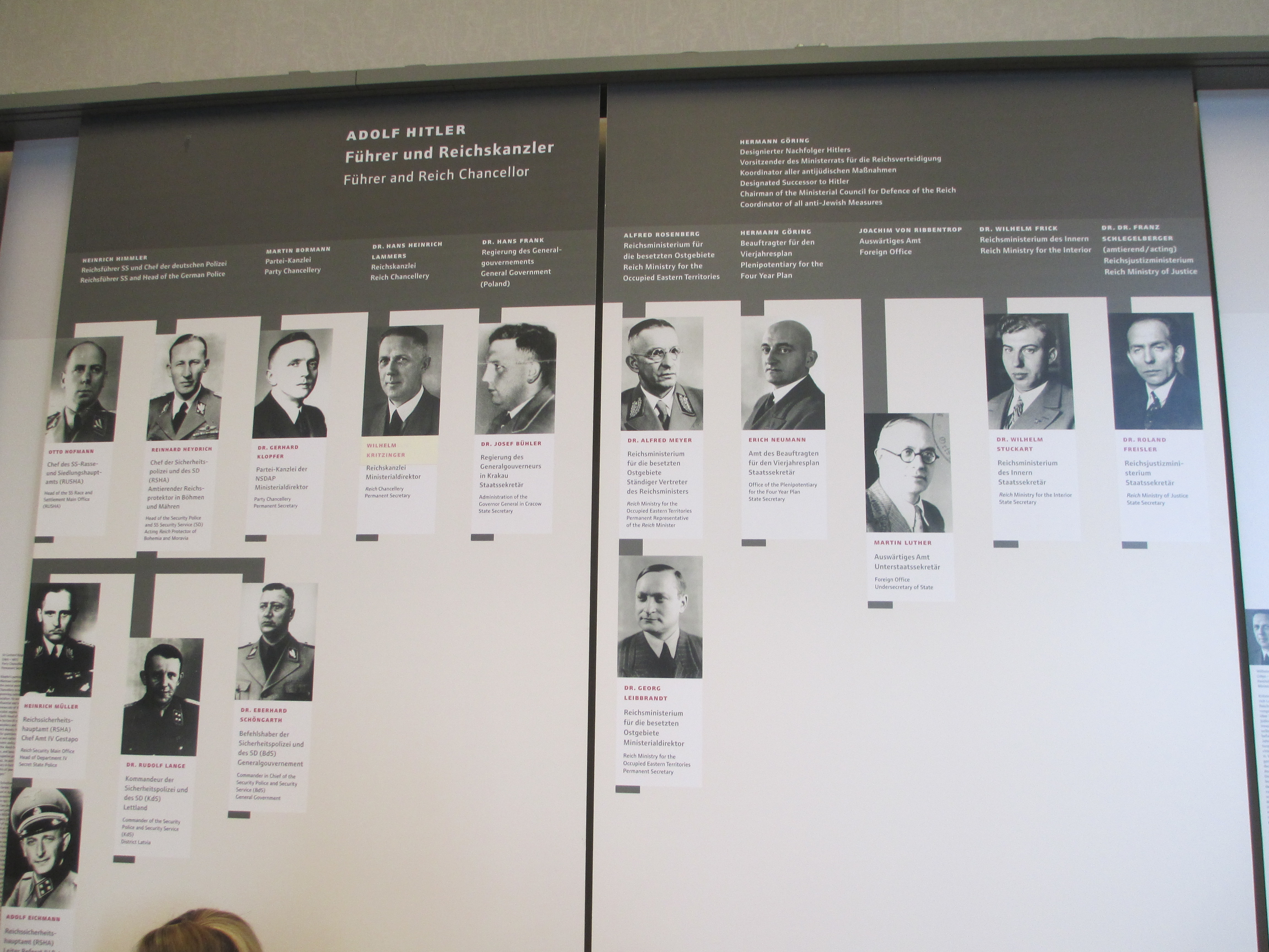 תמונות משתתפי ועידת ואנזה בווילה ואנזה